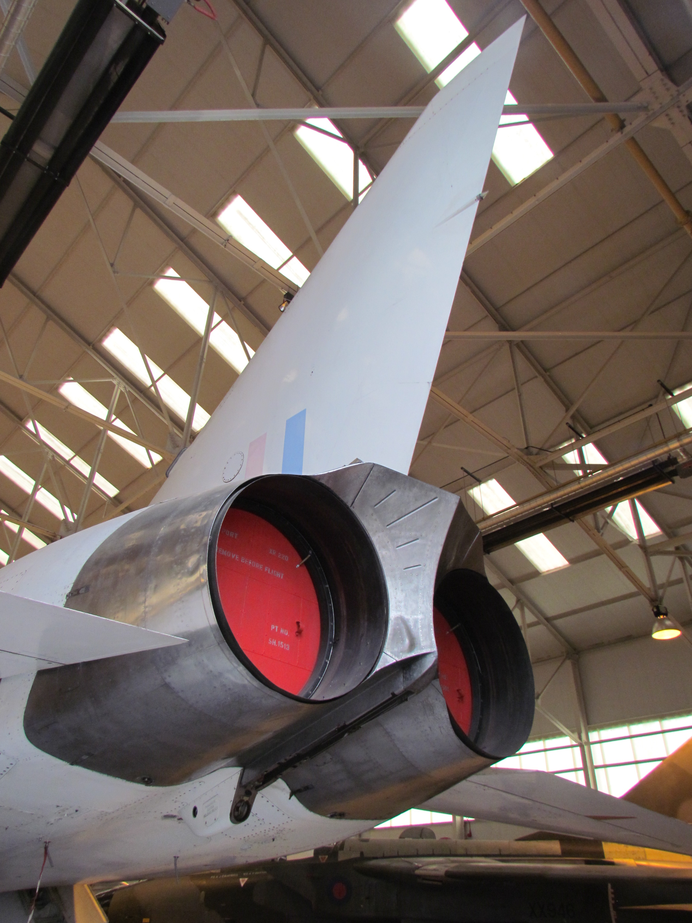 Tail